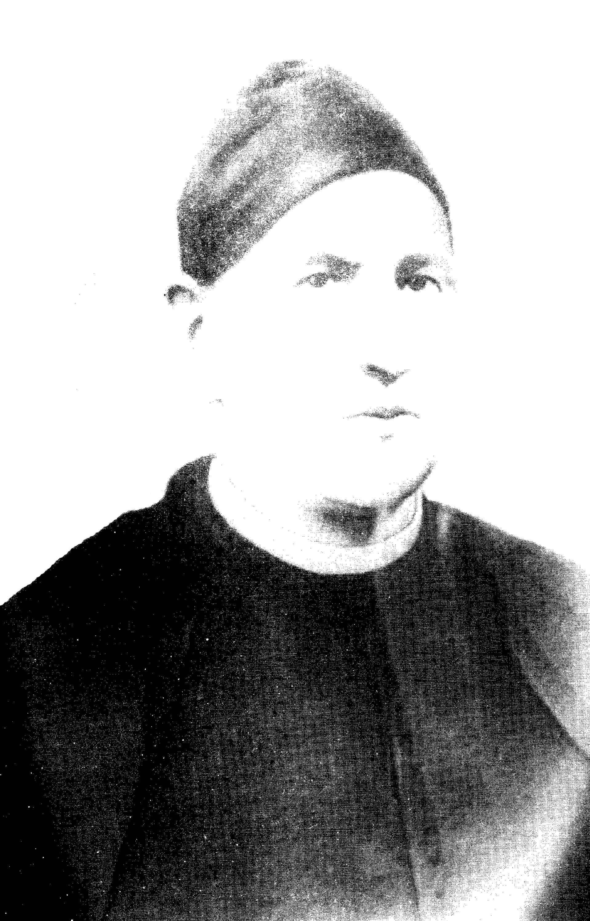 Descrição: Fotografia do Padre Manuel José Gonçalves Couto (1819-1897) exposta publicamente na capela onde jaz (Telões, Vila Pouca de Aguiar), e que ilustra a 17ª edição de "Missão Abreviada". Fonte/Créditos: (Foto feita a partir da publicamente exposta na capela onde jaz Manuel Couto) Licença: (sem quaisquer direitos; domínio público) (Consulta Copyright e direitos autorais) Atenção: Somente imagens livres para qualquer uso, sem restrição, são aceitas!